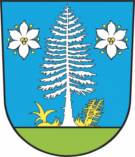 znak, Cikháj, okres Žďár nad Sázavou